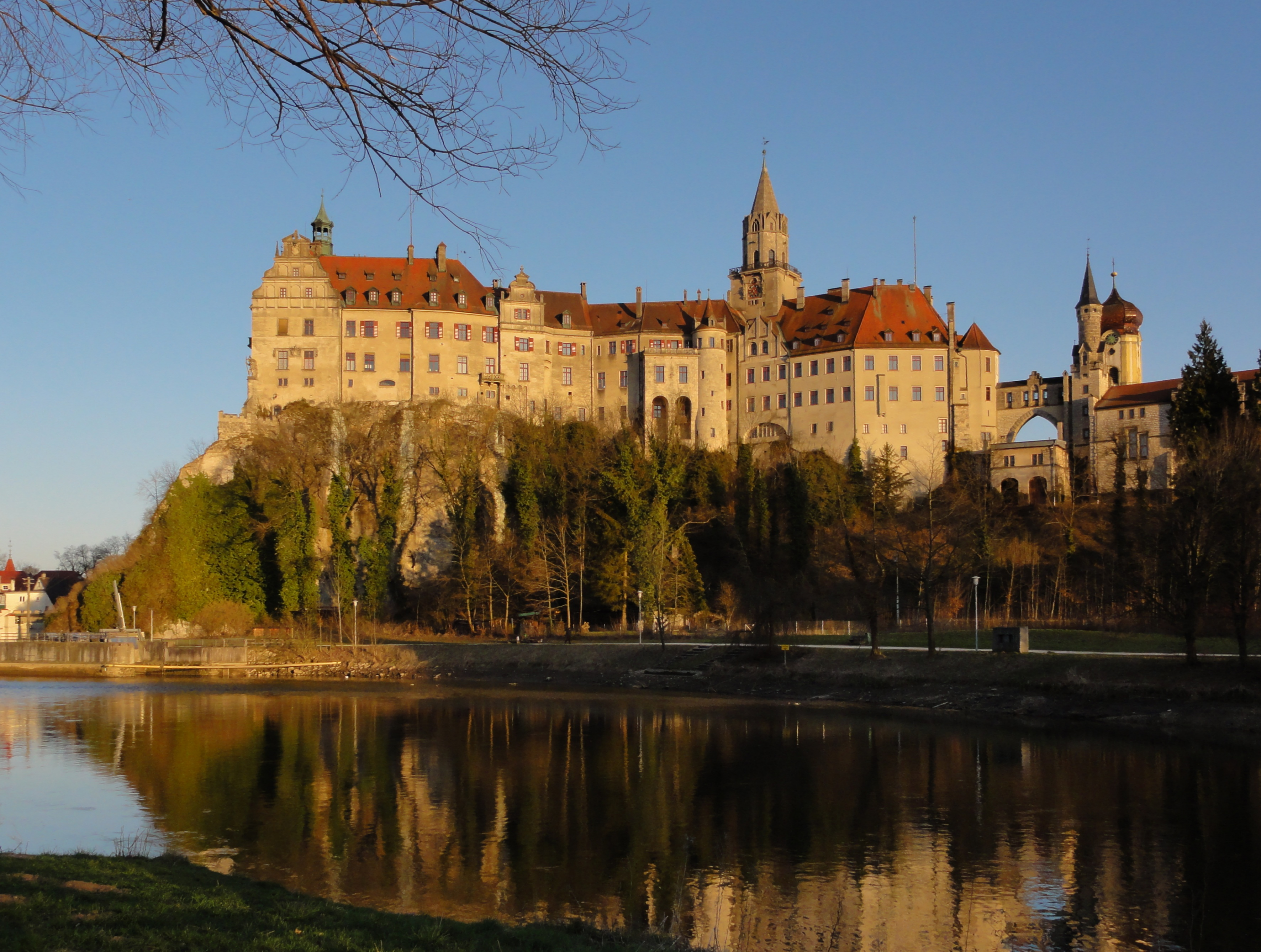 SchlossSigmaringen, Nordwest-Ansicht